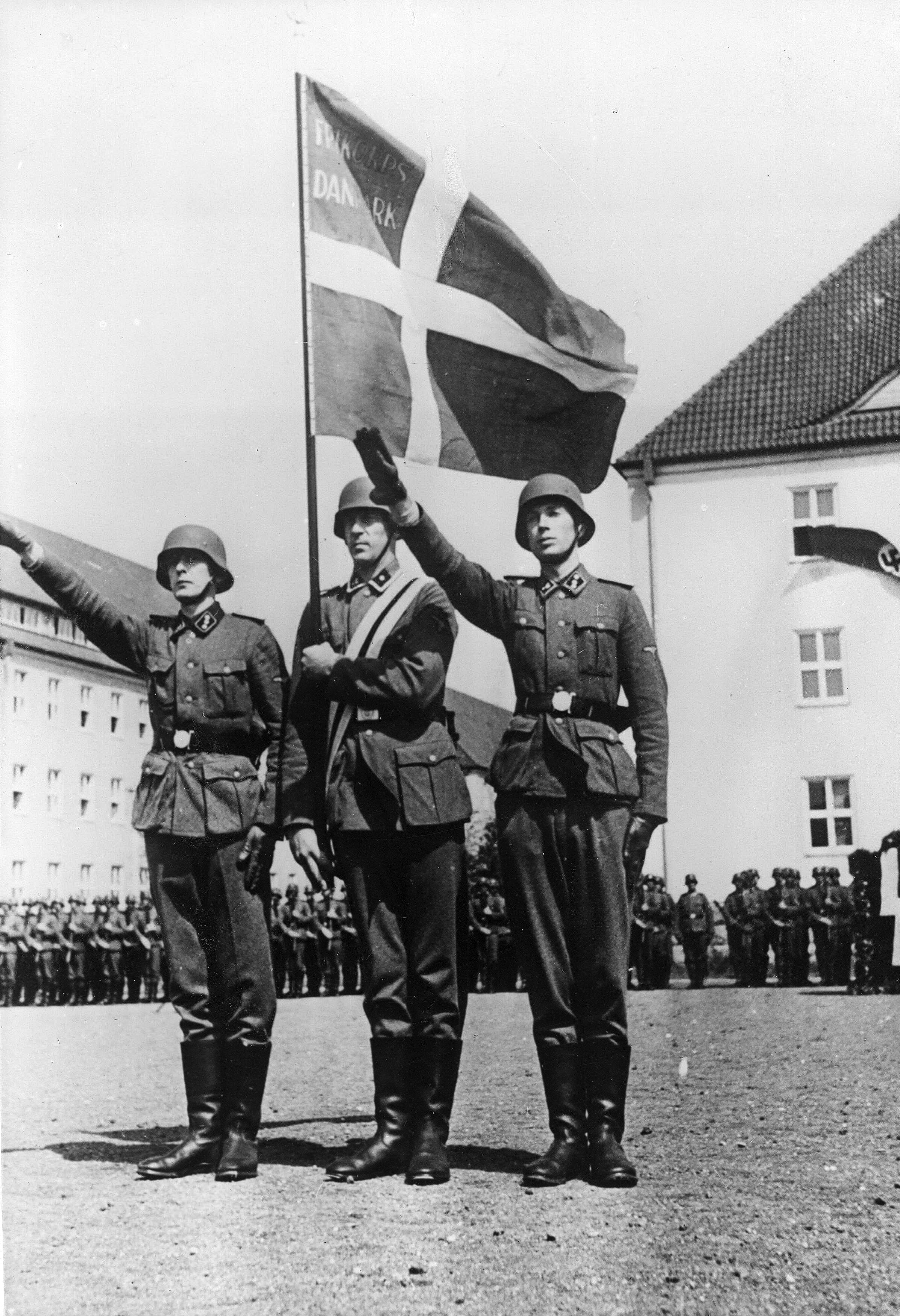 Żołnierze Frikorps Danmark podczas zaprzysiężenia w koszarach SS Hamburg-Langenhorn